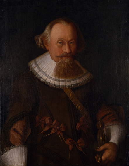 Portrait de Georges Guillaume, baron Waldner de Freundstein, né en 1583, mort en 1640 à Bâle où il est enseveli ; il fut administrateur des seigneuries de Roetelen et de Sausenberg pour le compte des margraves de Baden Dourlach ; portrait daté de 1633.